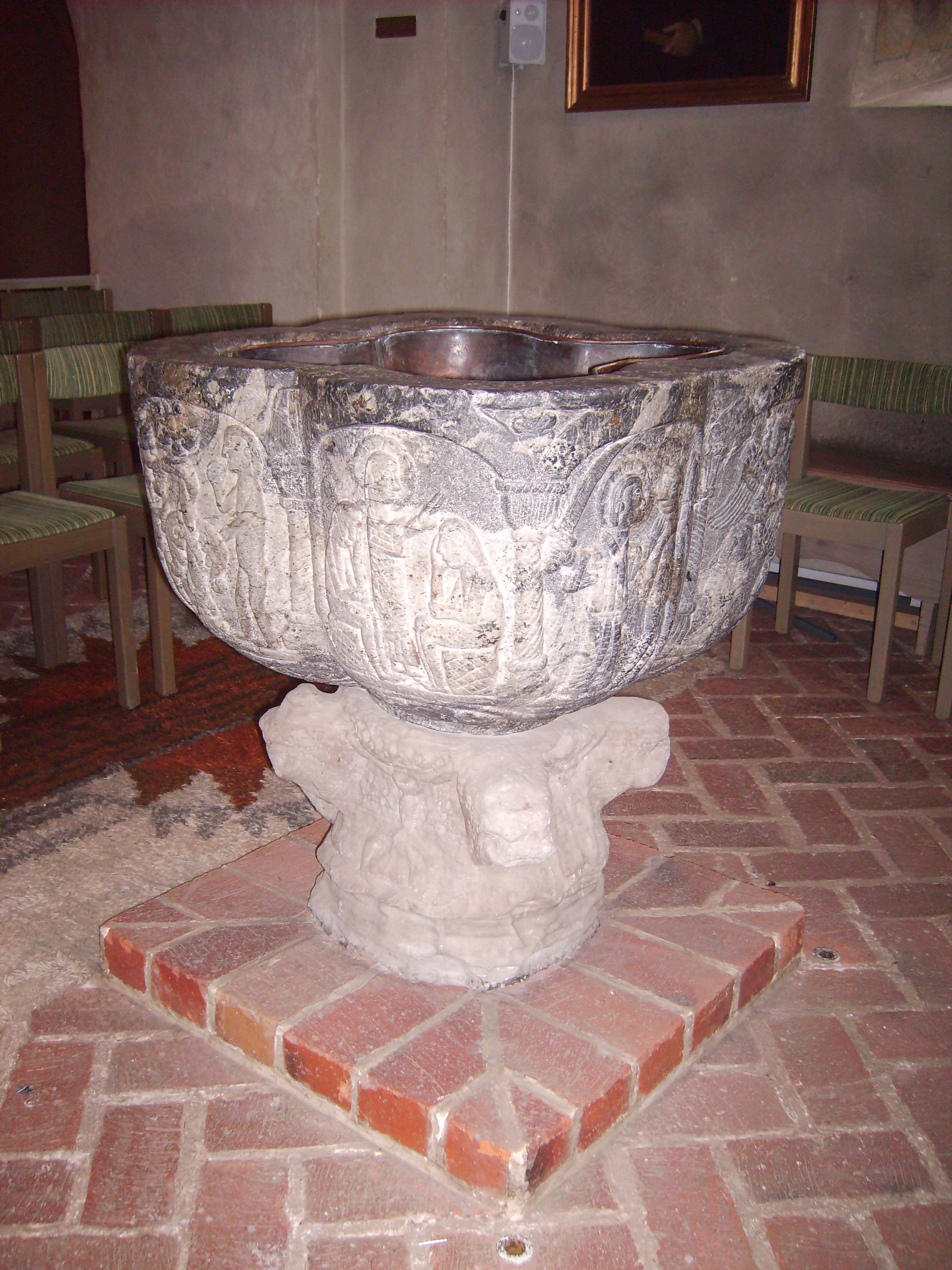 Östra Eneby kyrka, a Middle Age church in Norrköping (interior, medieval baptismal font).